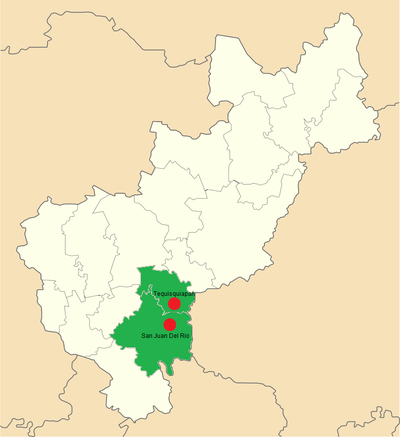 Ubicacion geografica del Area conurbada